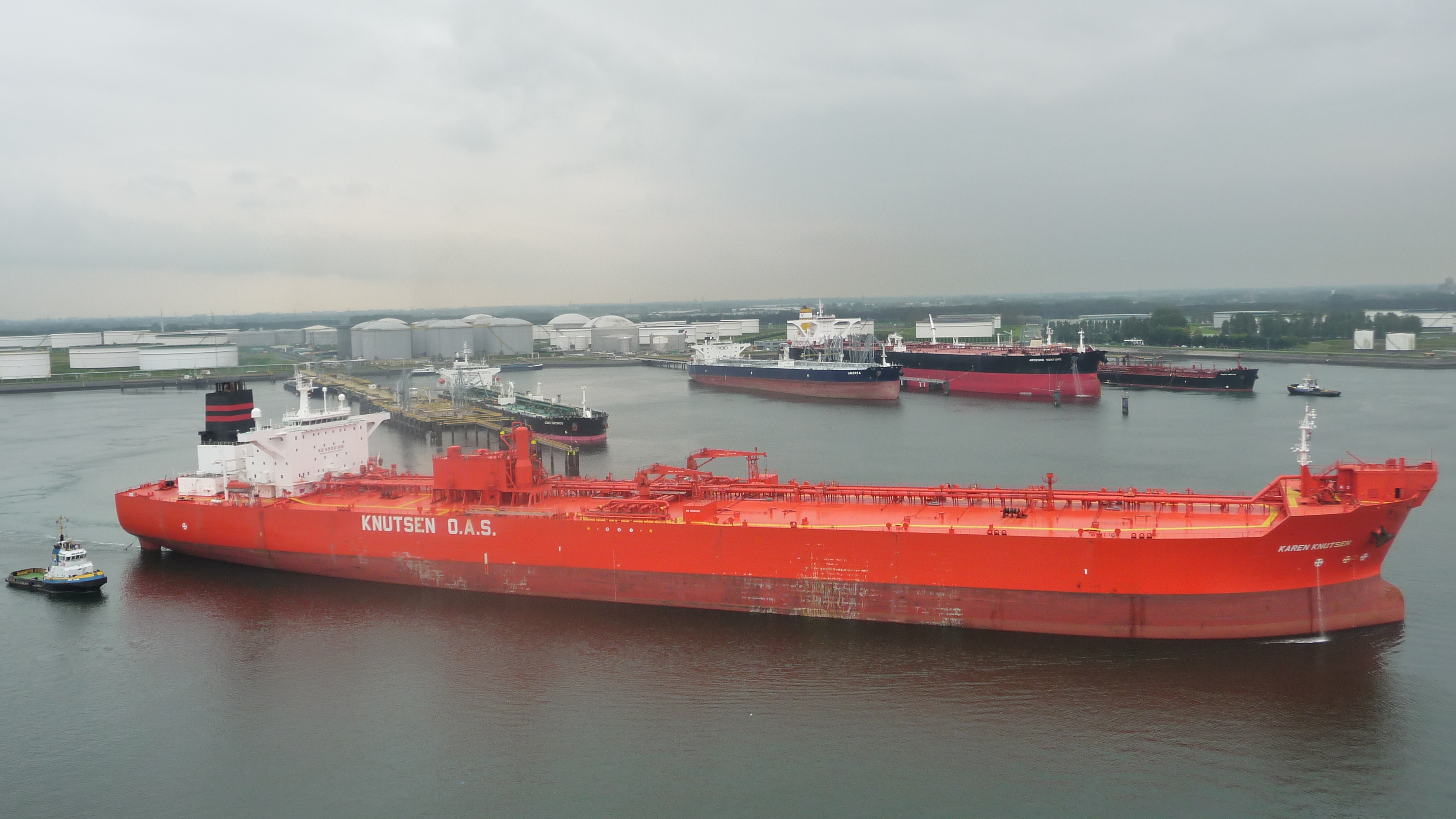 Karen Knutsen in ballast tijdens vertrek uit de Zevende Petroleumhaven